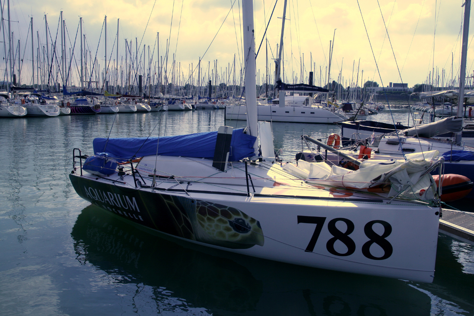 Le mini 6.50 d’Aymeric Chappellier La Tortue de l’Aquarium La Rochelle aux Minimes